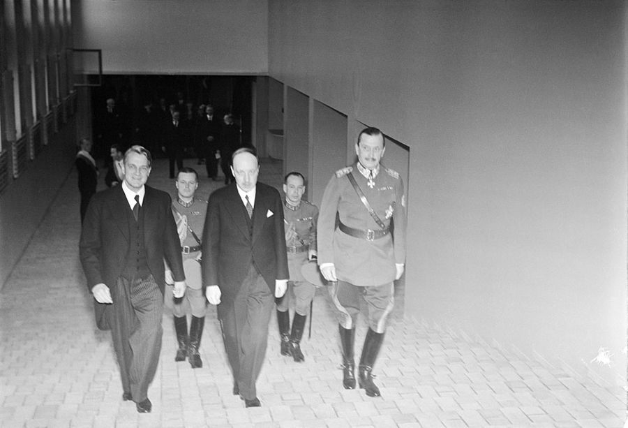 Description